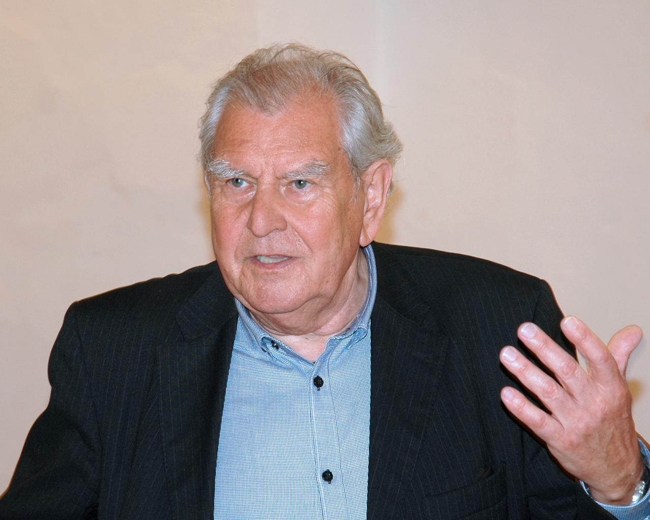 Zdenek Felix (2013)